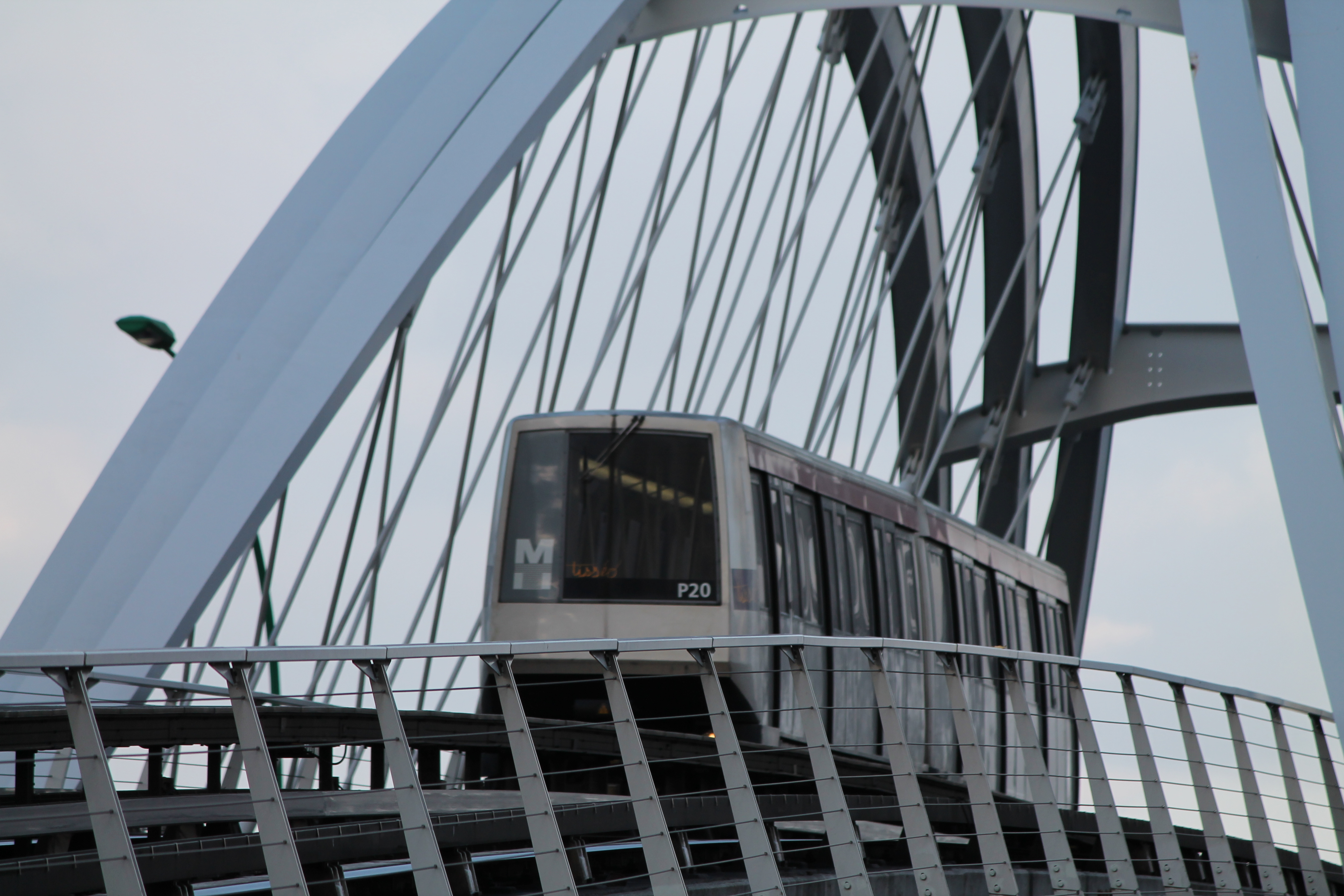 Une rame de VAL206 sur le viaduc Rocade de la ligne A du métro de Toulouse.